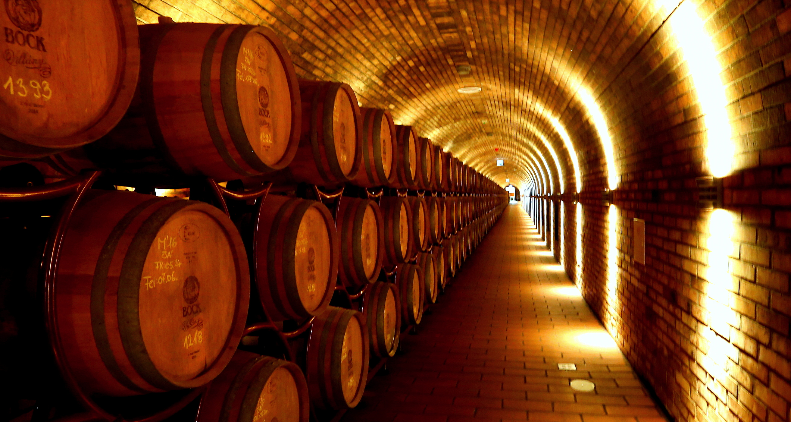 Bock Pince, H-7773 Villány, Batthyány utca 15